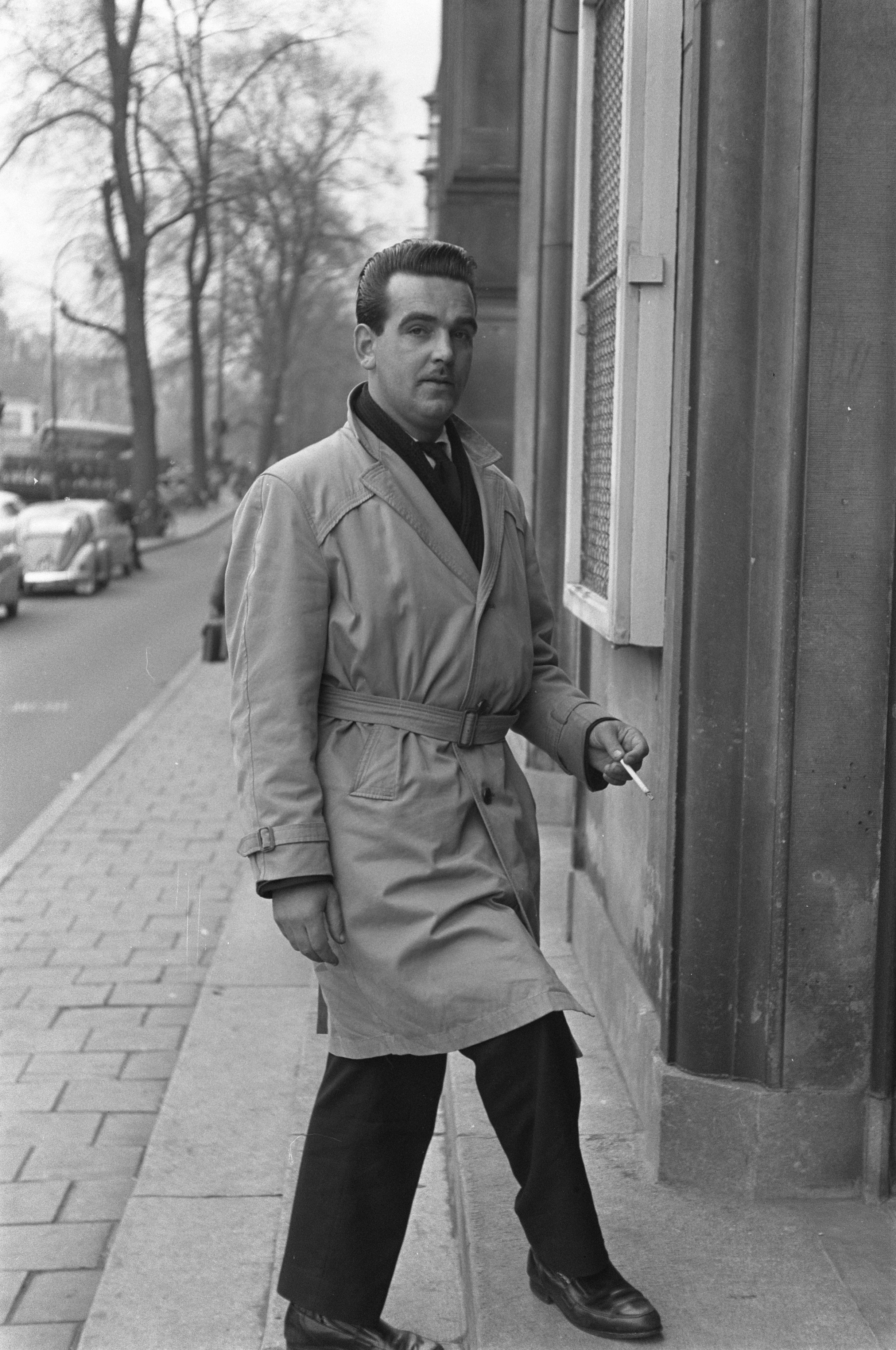 Collectie / Archief : Fotocollectie Anefo Reportage / Serie : Rechtzaak "Magere Josje" Beschrijving : Kroongetuige A. van Riek Datum : 19 november 1959 Trefwoorden : Rechtszaken, kroongetuigen Persoonsnaam : Riek, A. van Fotograaf : Fotograaf Onbekend / Anefo Auteursrechthebbende : Nationaal Archief Materiaalsoort : Negatief (zwart/wit) Nummer archiefinventaris : bekijk toegang 2.24.01.05 Bestanddeelnummer : 910-8351